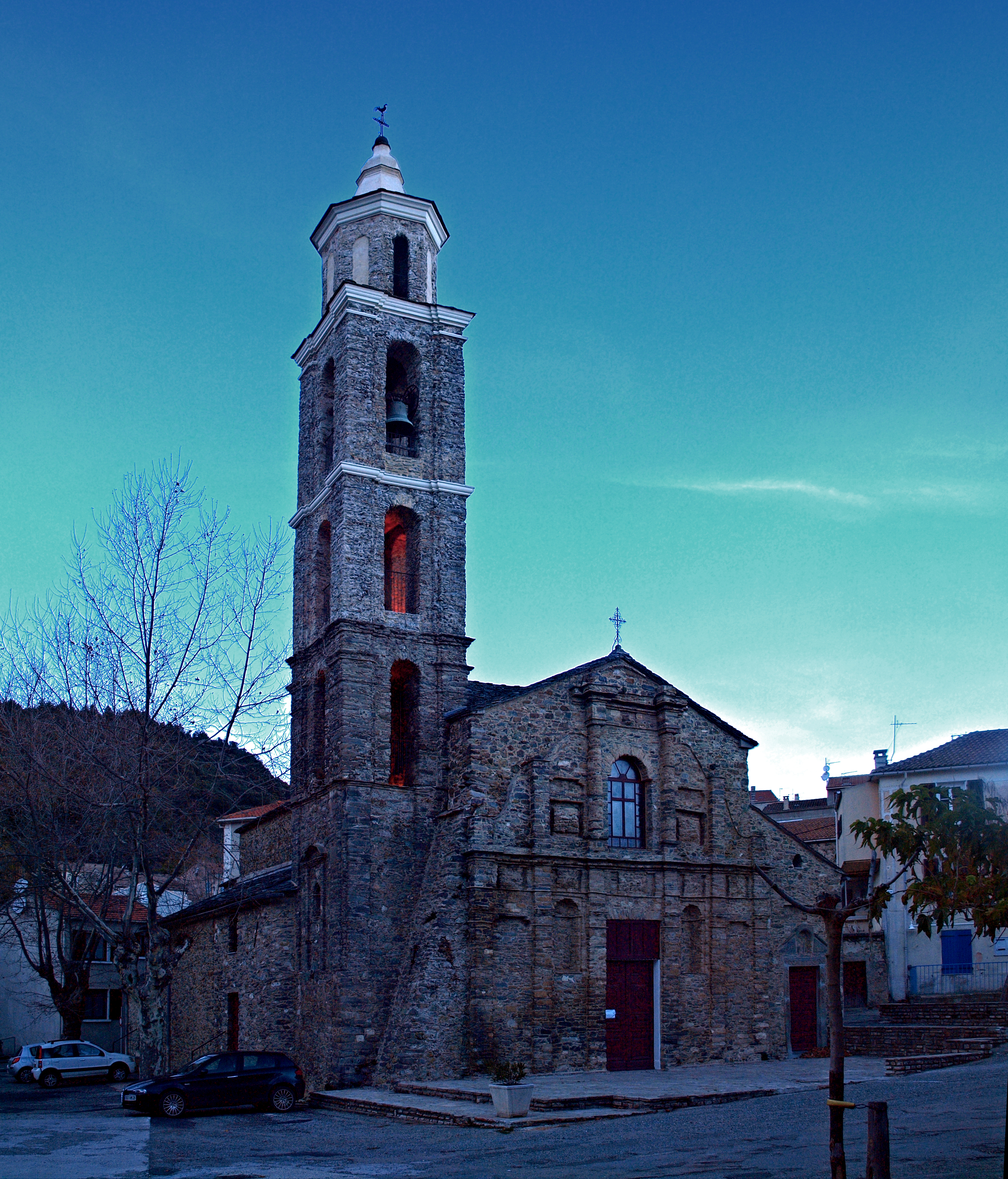 Vezzani (Corse) - L'église de l'Annonciation à «l'heure bleue»